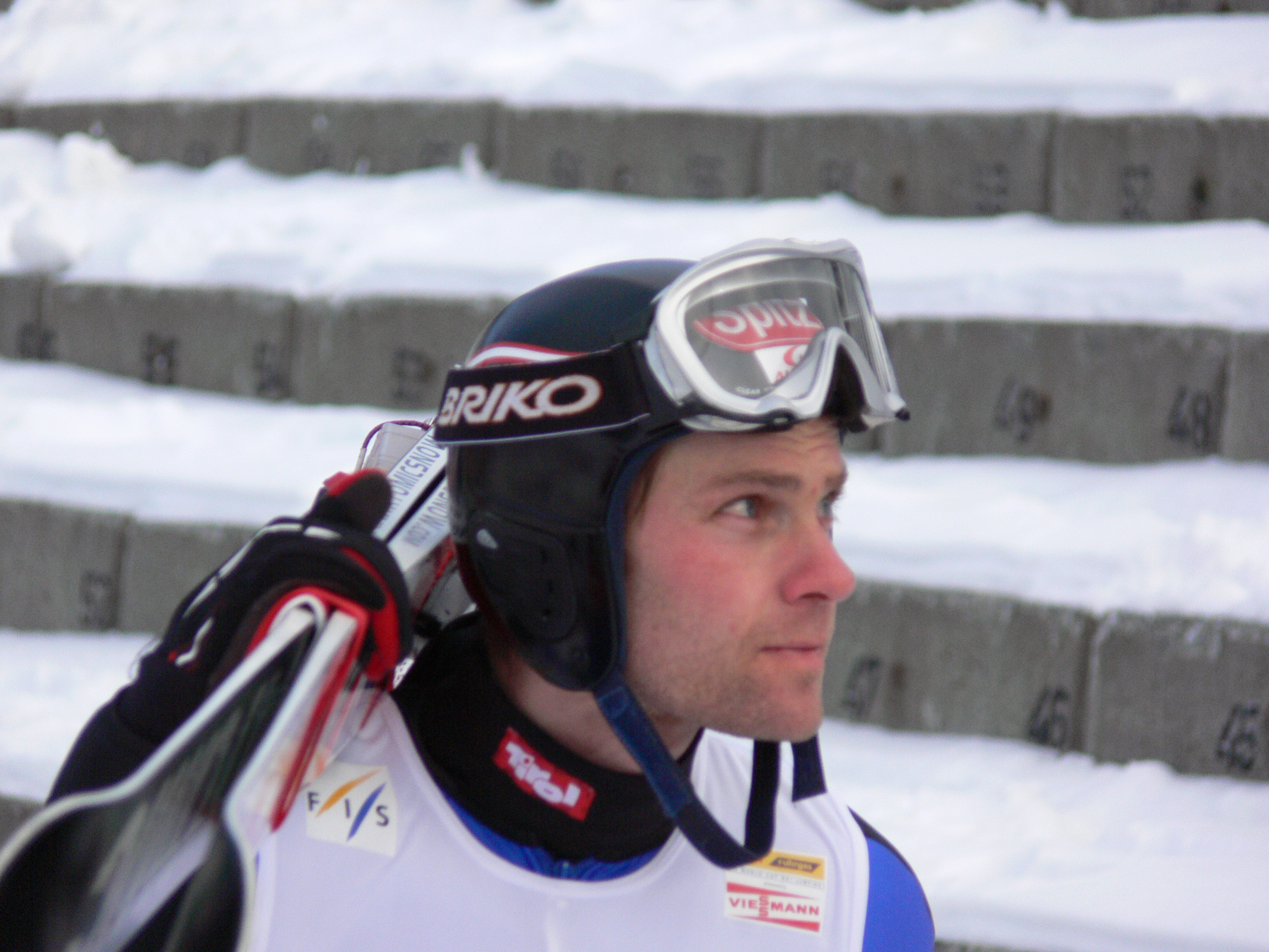 Taken at the annual ski jumping event in Holmenkollen in 2006.